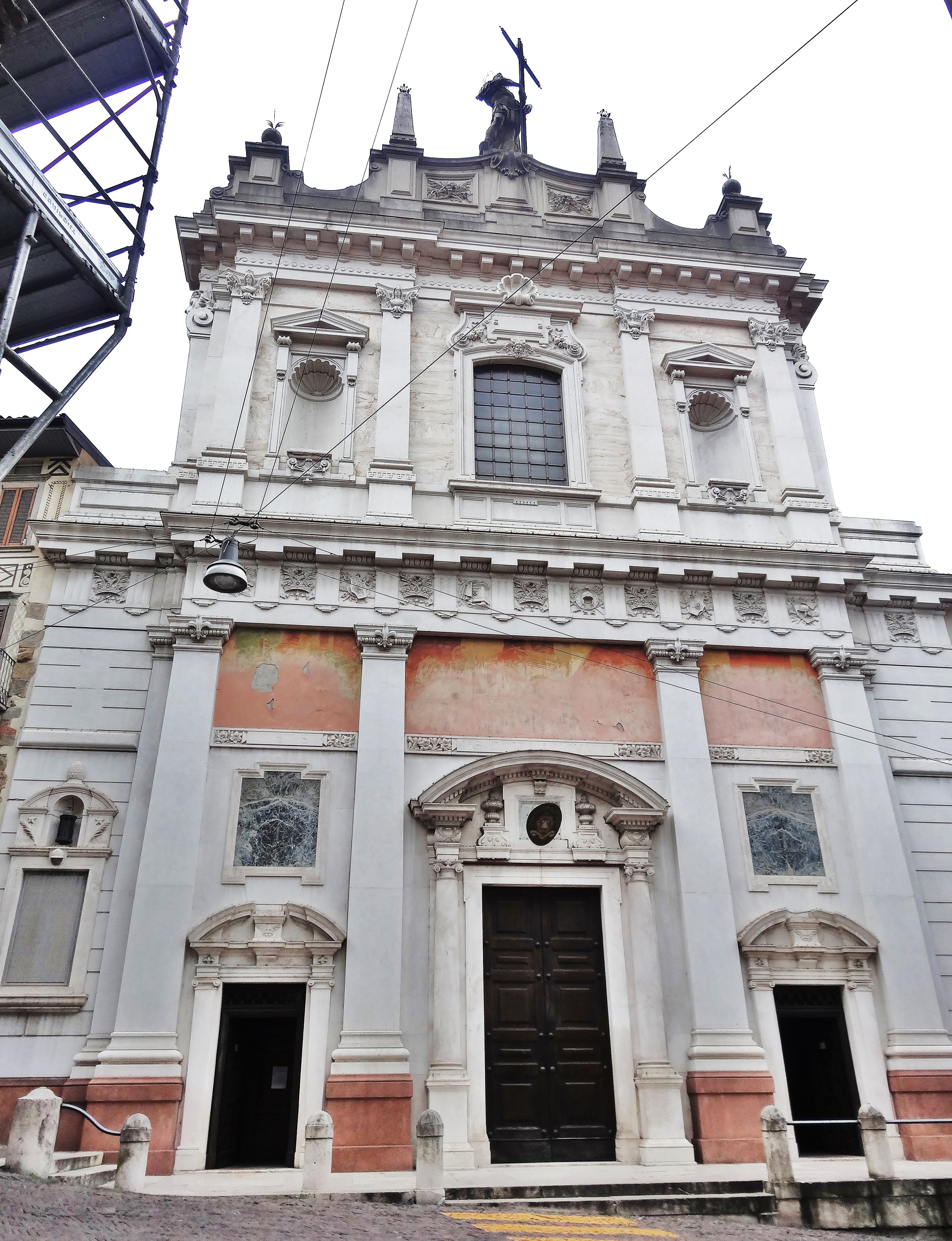 Bergamo, die Chiesa di Sant'Alessandro in Croce in der Unterstadt